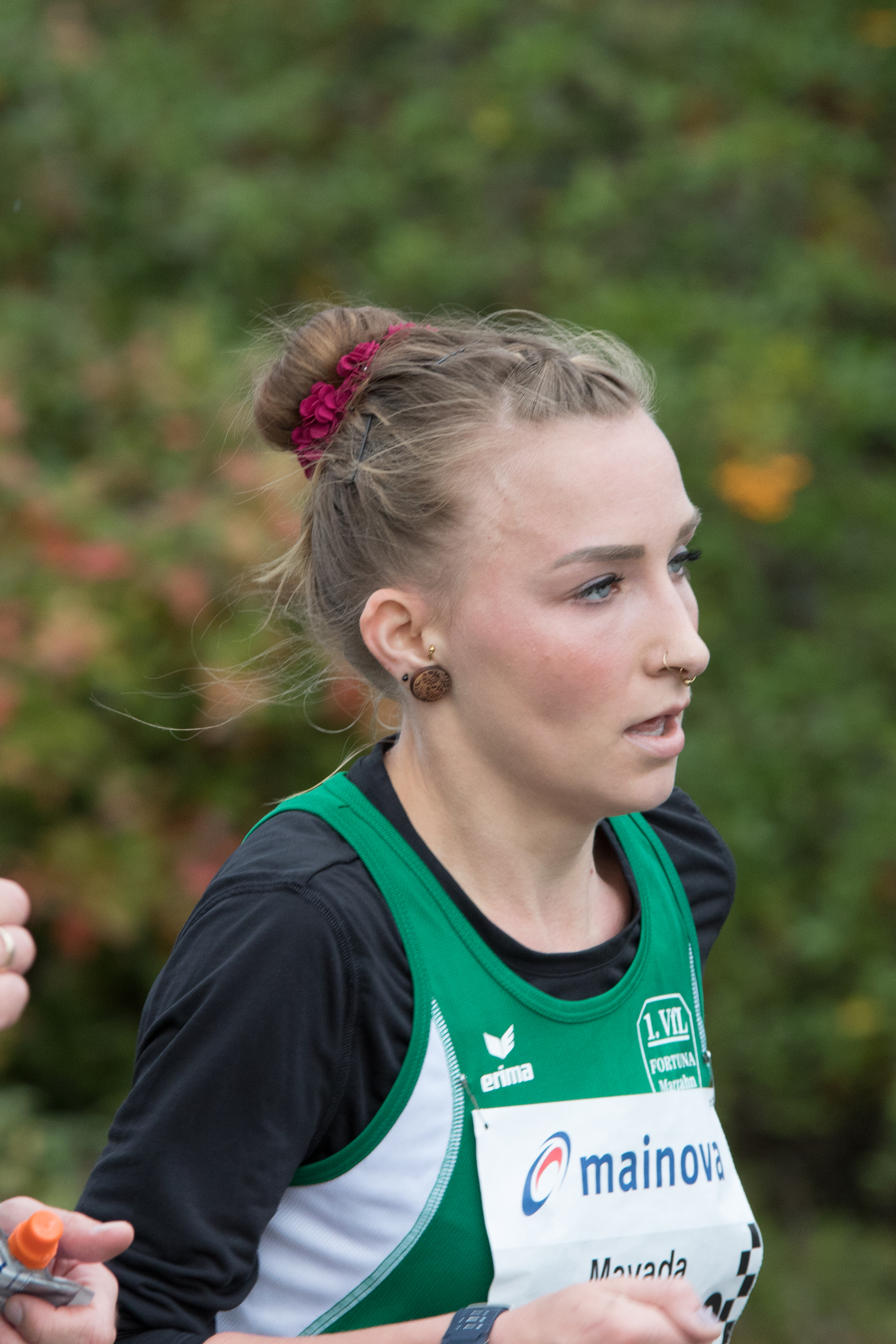 Mayada Al-Sayad, Frankfurt Marathon 2017